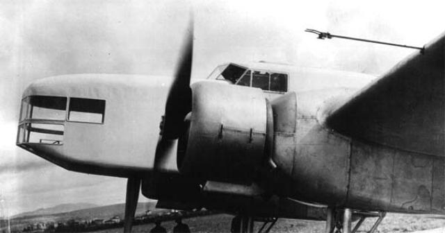 CANT Z.1011particolare dei motori radiali